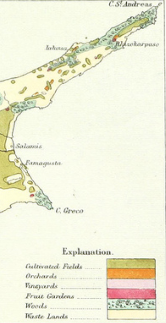 Ausschnitt aus LANG(1878)_p010_AGRICULTURAL_MAP.jpg